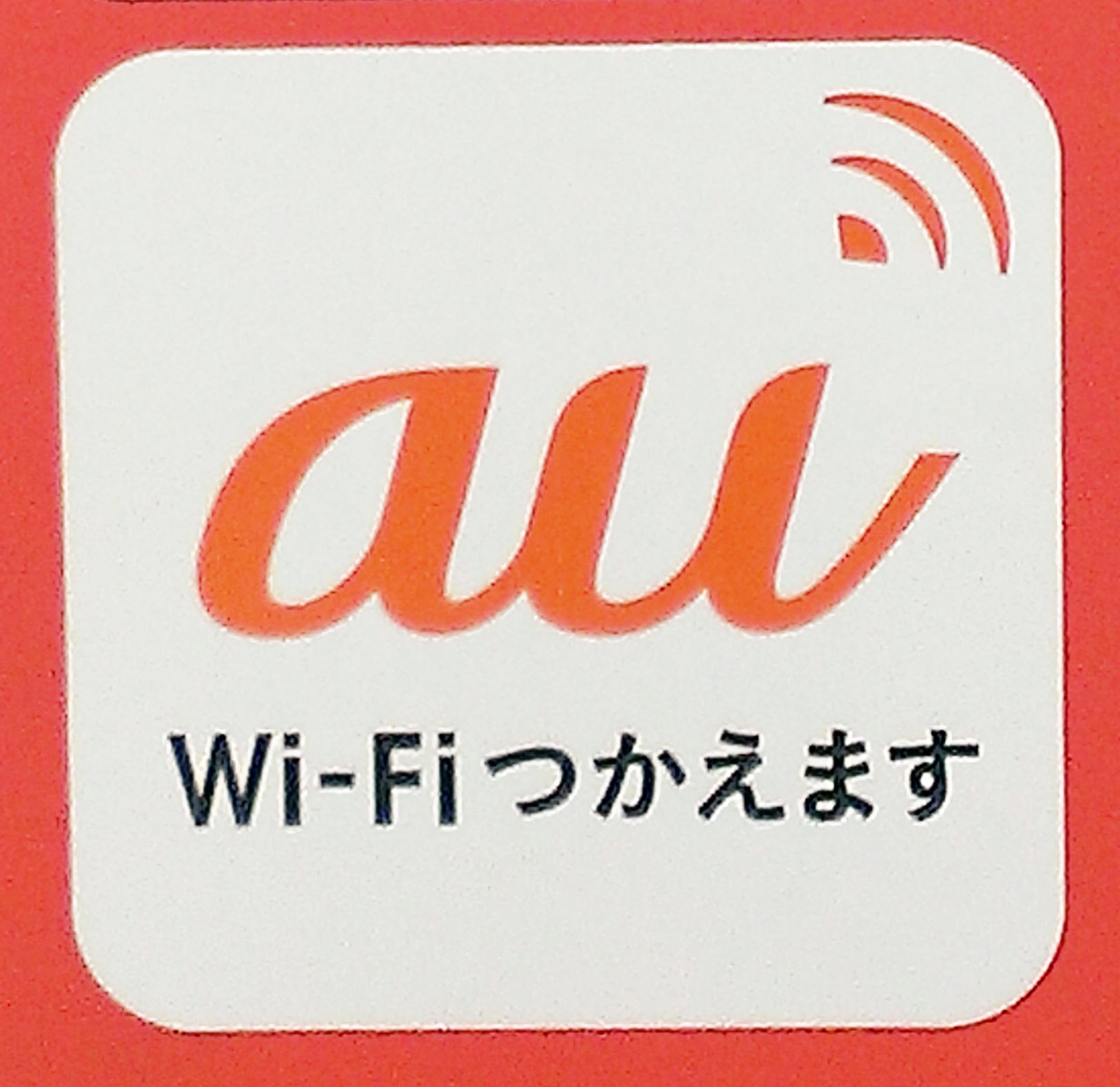 au Wi-Fiスポットの利用が出来る箇所の表示